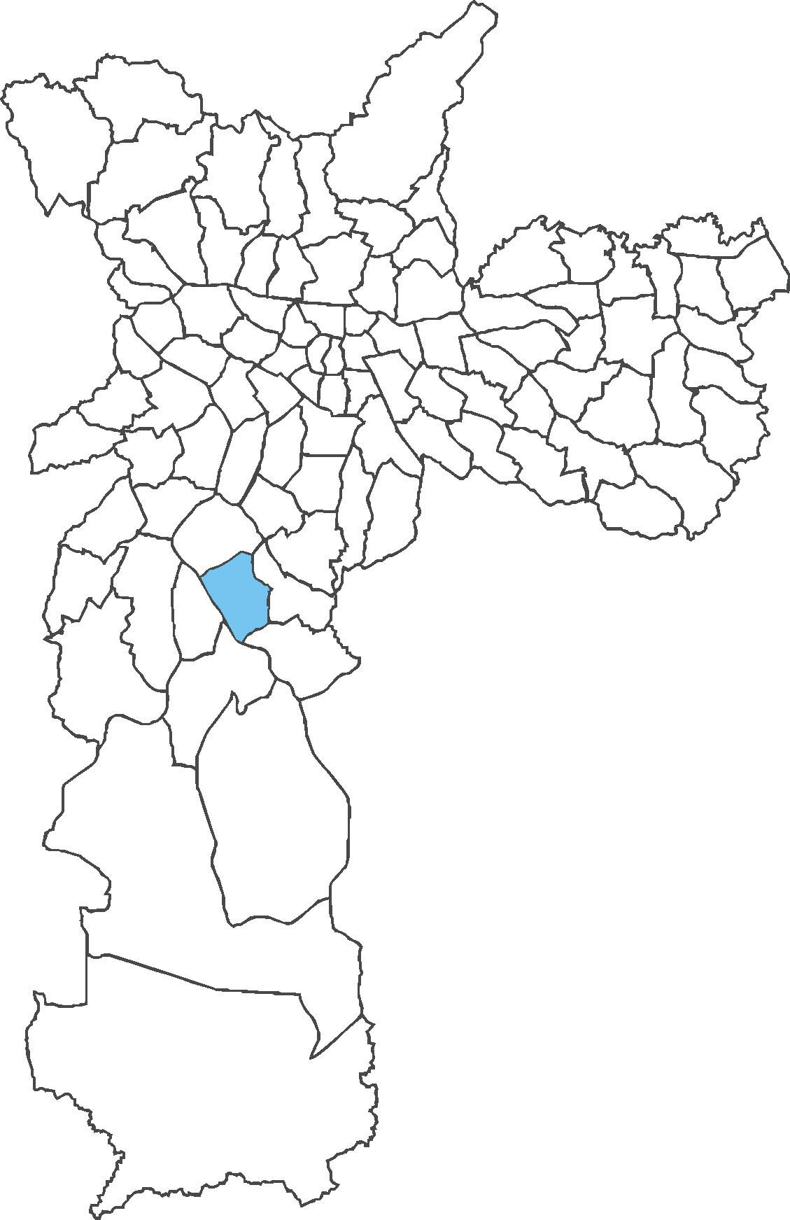 Localização do distrito de Campo Grande no município de São Paulo.